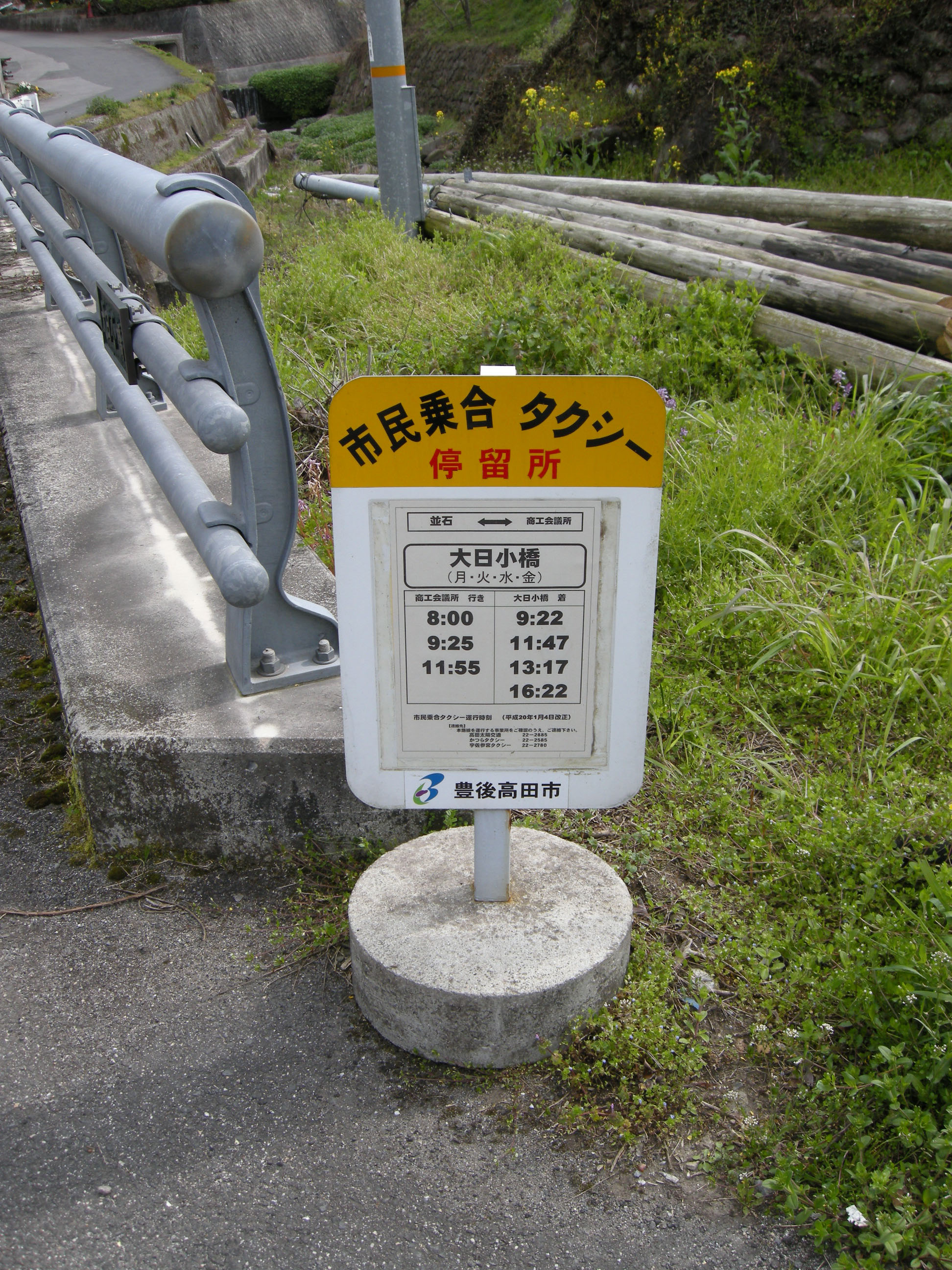 豊後高田市「市民乗合タクシー」の停留所 Nikon Coolpix P5100